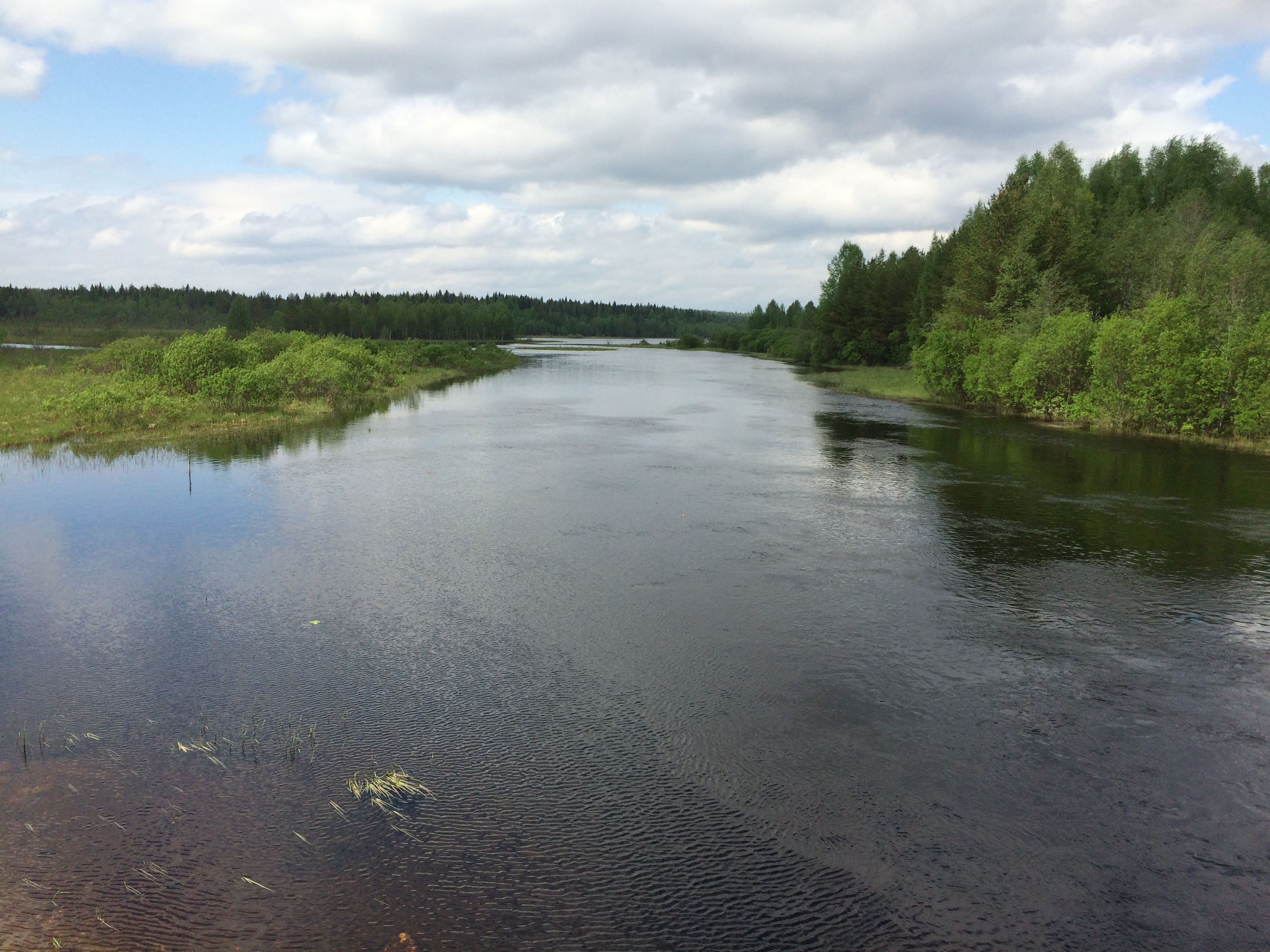 р. Гумарина